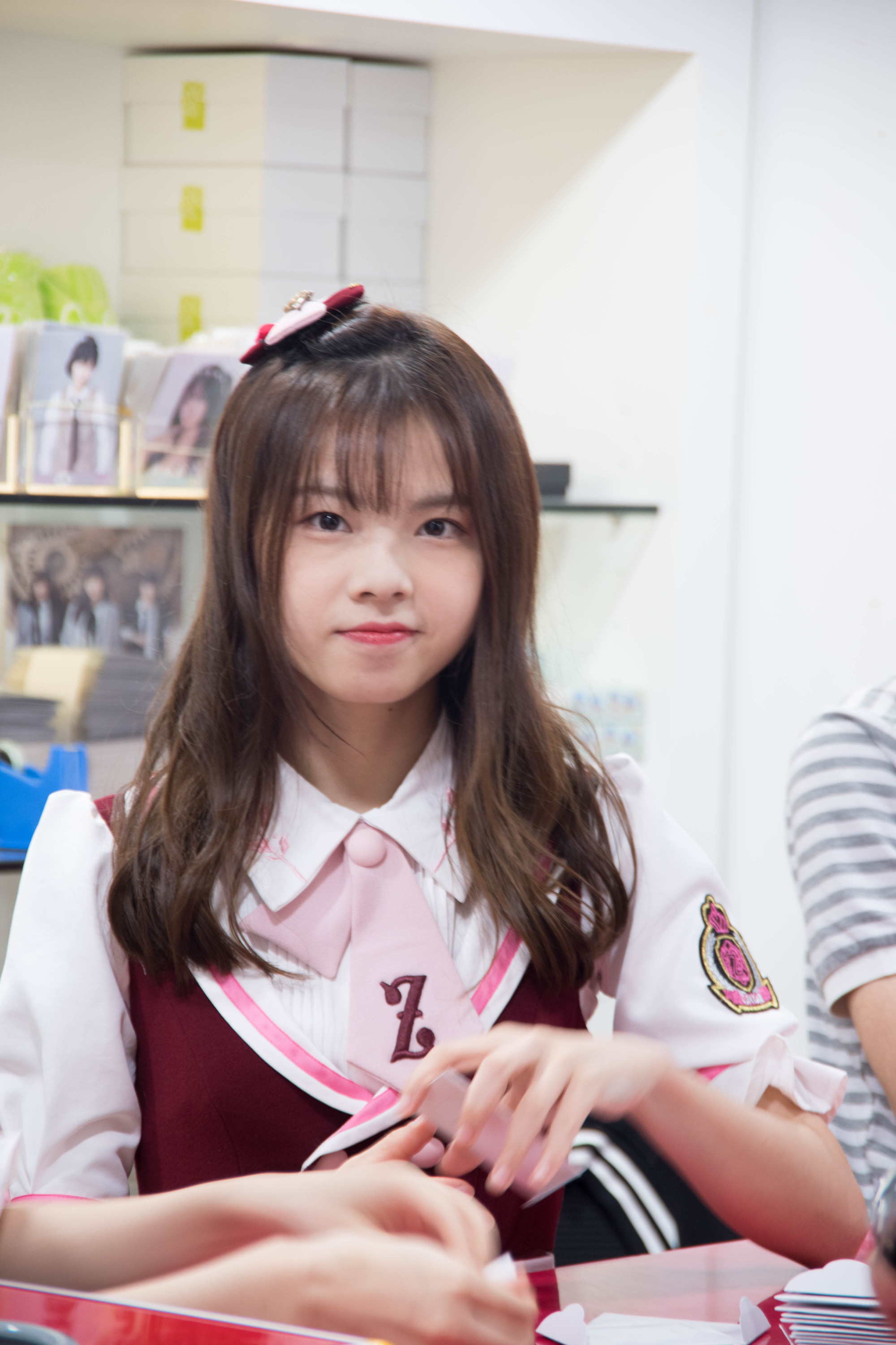 20171001——一日店员服务（龙亦瑞、农燕萍）